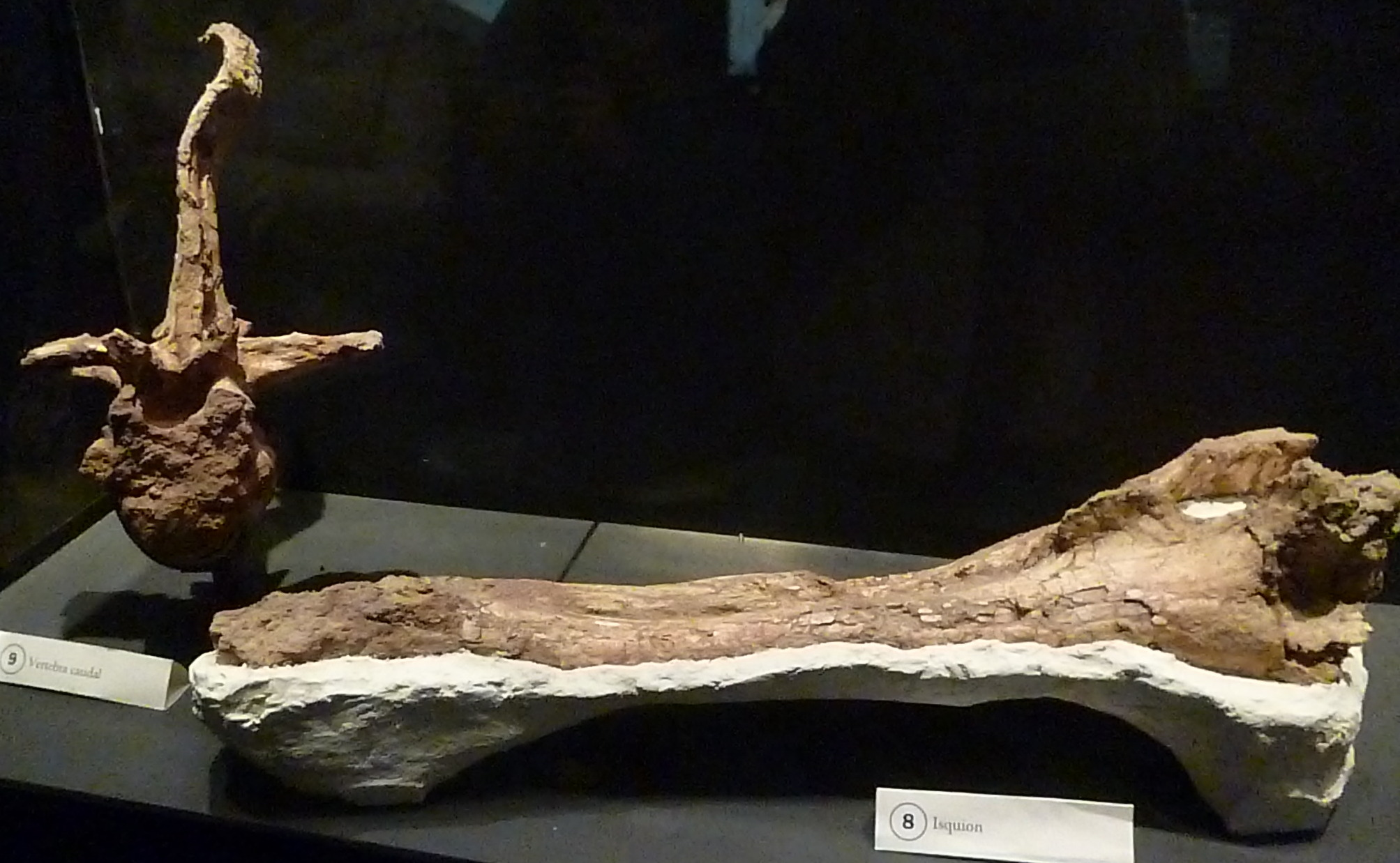 Fósiles del Tyrannotitan en el MEF de Trelew